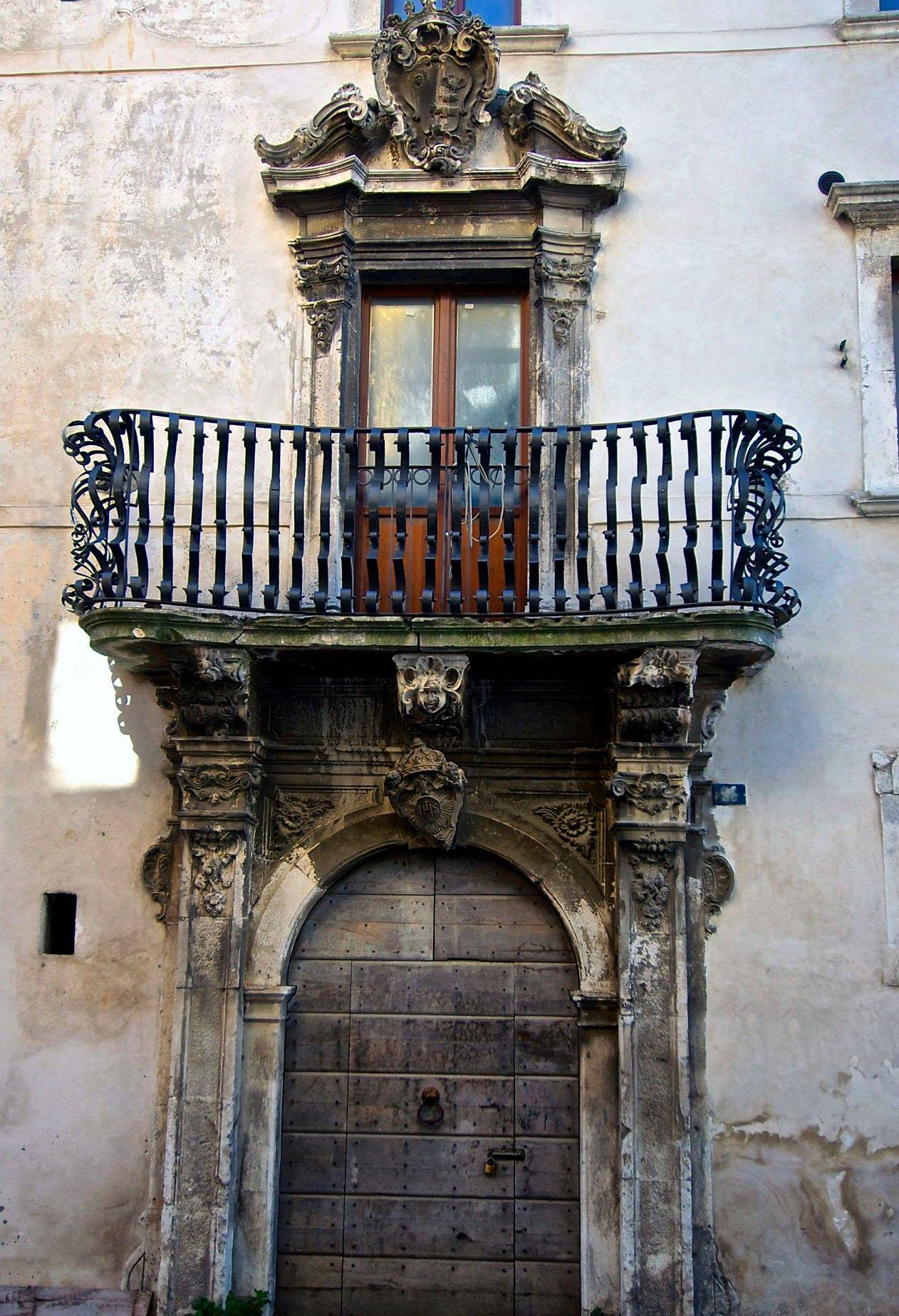 Palazzo Muzj. Portale d'ingresso settecentesco con stemma sulla chiave d'arco della Compagnia di Gesù sormontato dal balcone con lo stemma di famiglia ducale